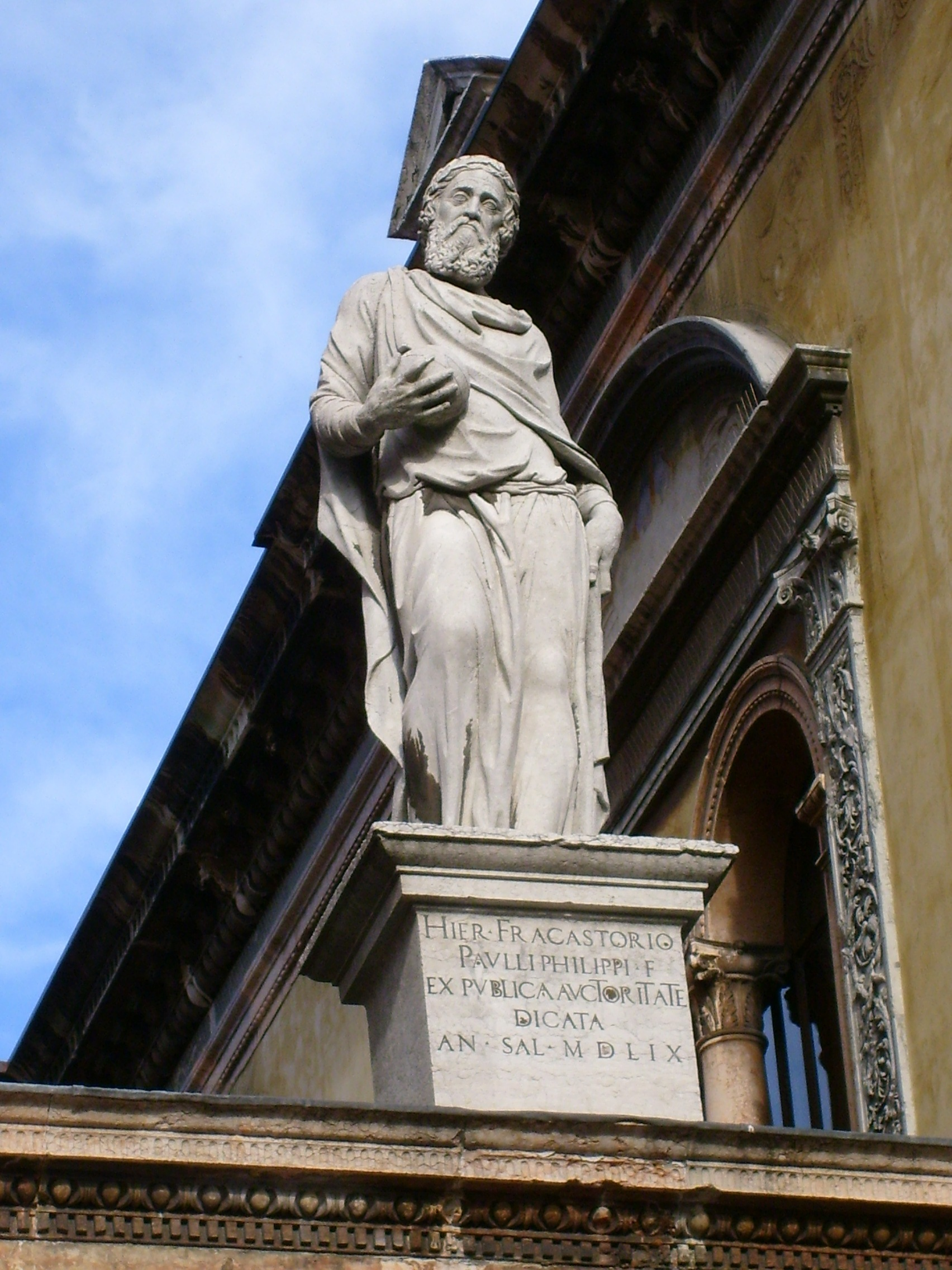 Girolamo Fracastoro's statue, Piazza dei Signori, Verona, Italy